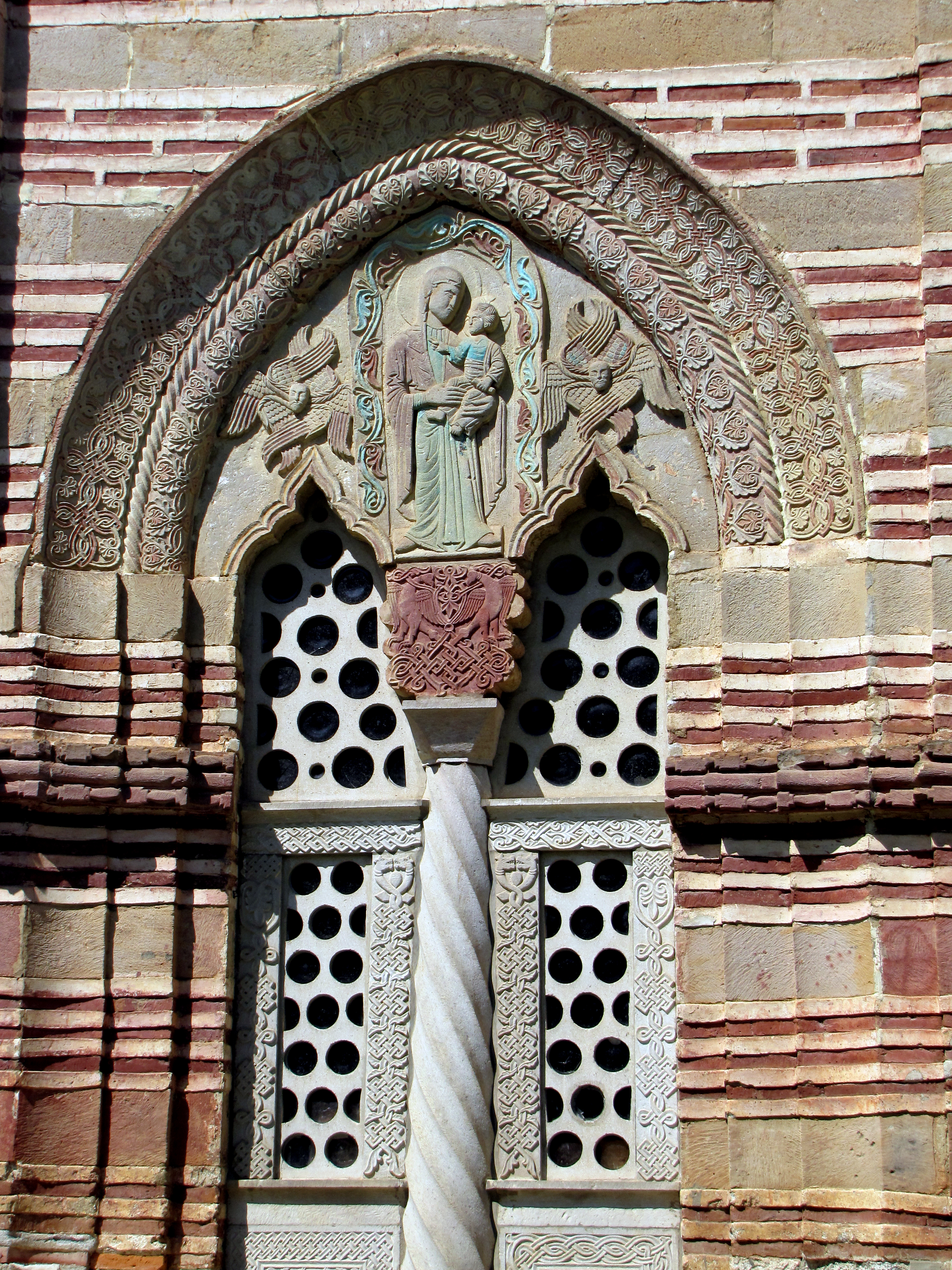 Храм посвећен Ваведењу Пресвете Богородице, Ктитор је достојанственик са двора деспота Стефана Лазаревића, по имену Богдан, са супругом Милицом и братом Петром, али се често говори да је ово деспотова задужбина, Храм се сматра најраскошнијом црквеном грађевином моравског стила, Подигнут је у периоду од 1407, до 1413. године, У турским пописима помиње се као Манастир Пречисте у Левчу, Не зна се када је запустео због турских зулума, Обновили су га монаси манастира Мораче, Страдао је више пута у доба буна и устанака